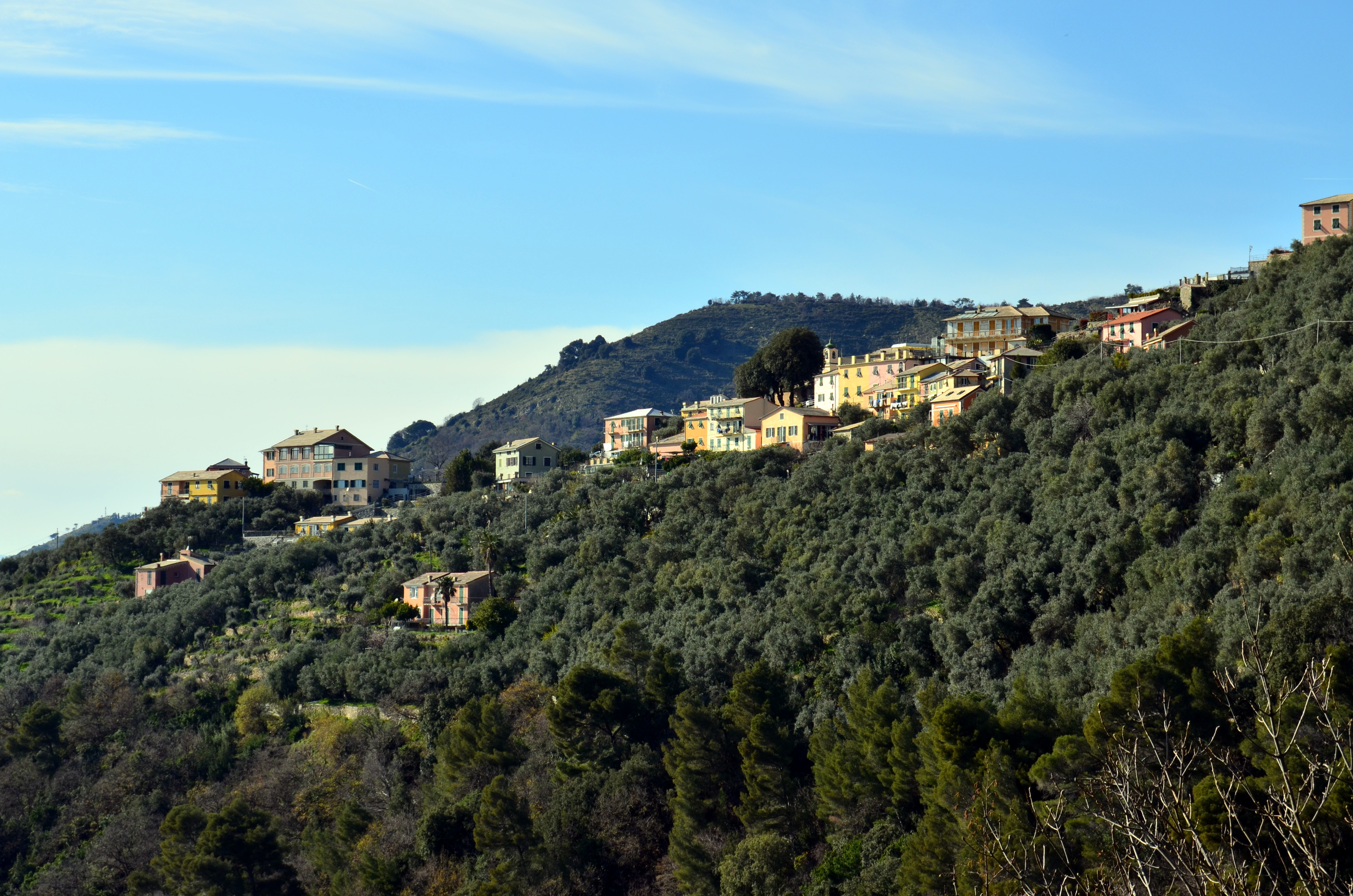 Panorama della frazione di San Bernardo, comune di Bogliasco, dal sentiero per Pieve Alta, Liguria, Italia